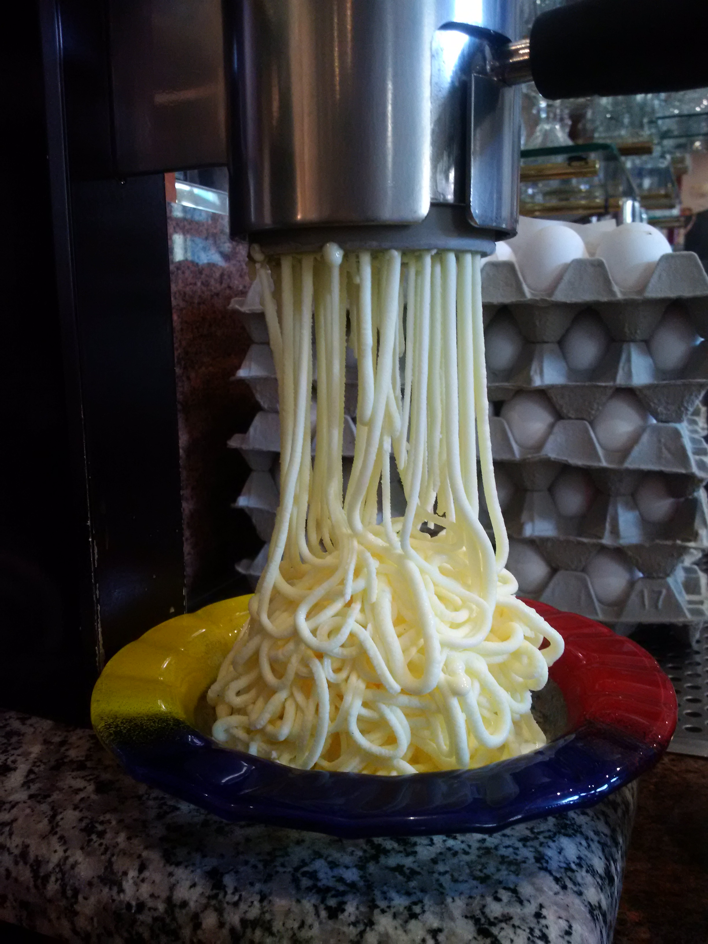 Presse für Spagettieis mit einzeln sichtbaren Spagetti